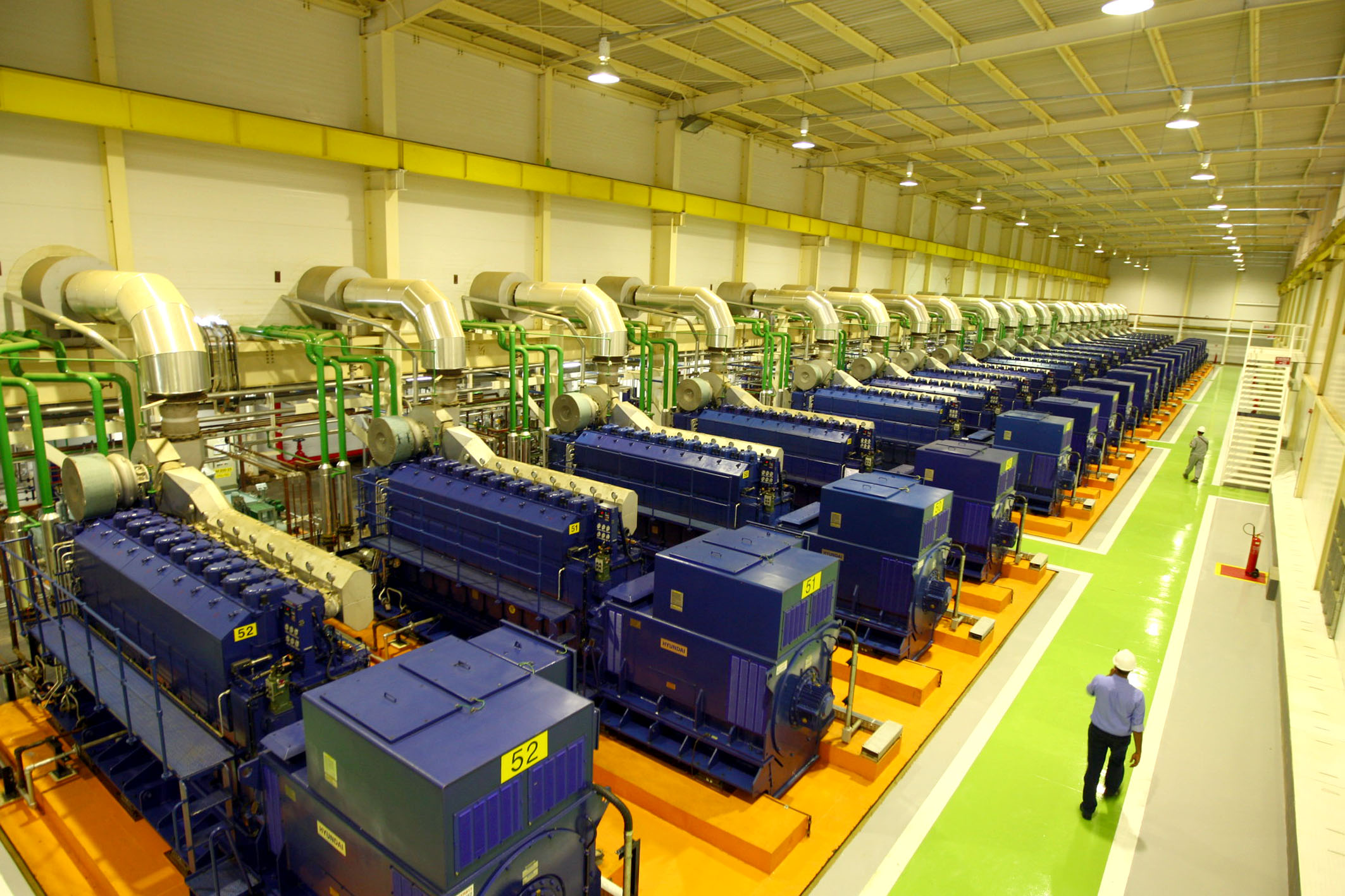 Usina termoelétrica em Camaçari, Bahia, Brasil